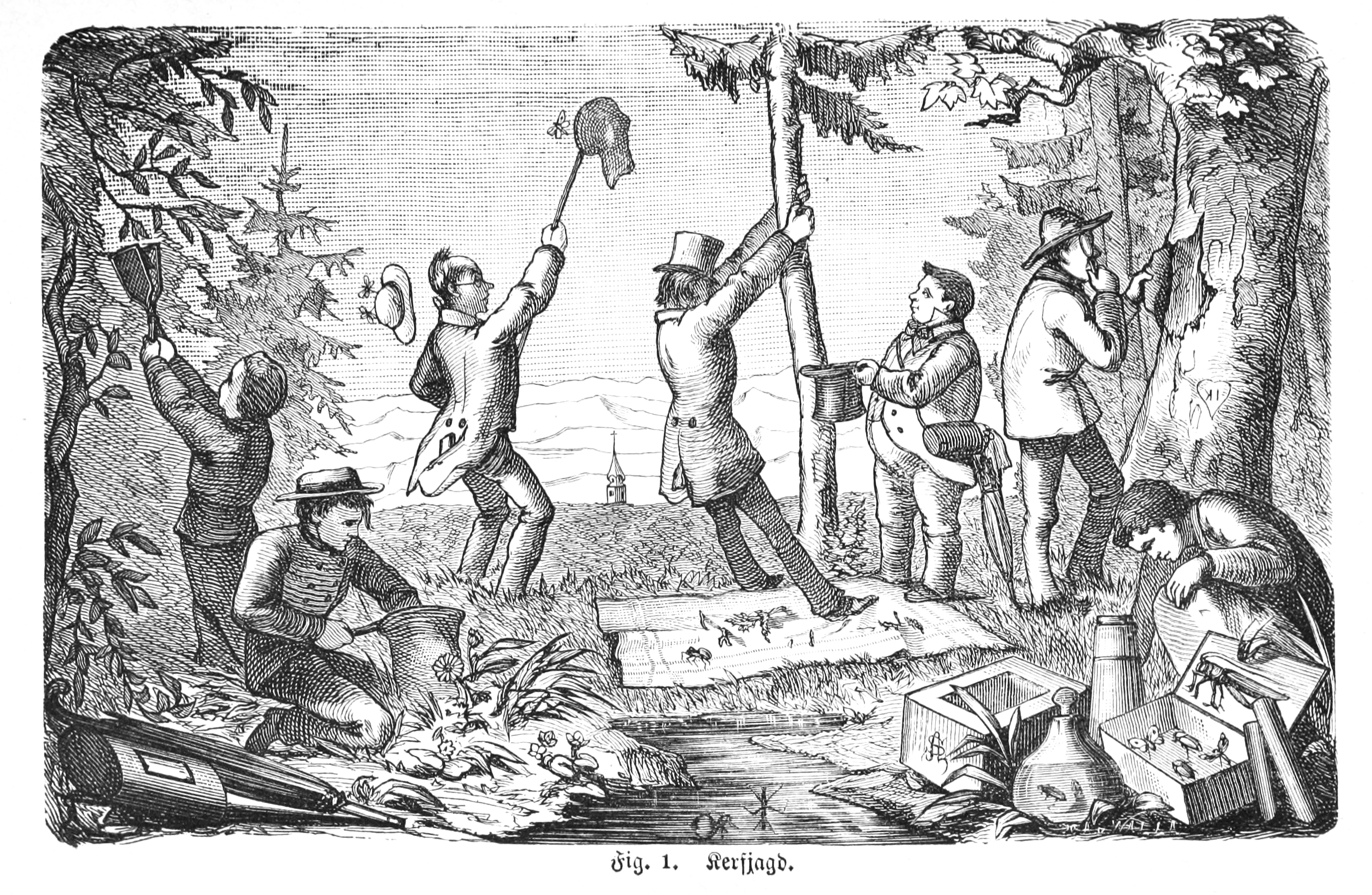 Kerfjagd - hunting for insects from Vitus Graber, Die Insekten (1877)